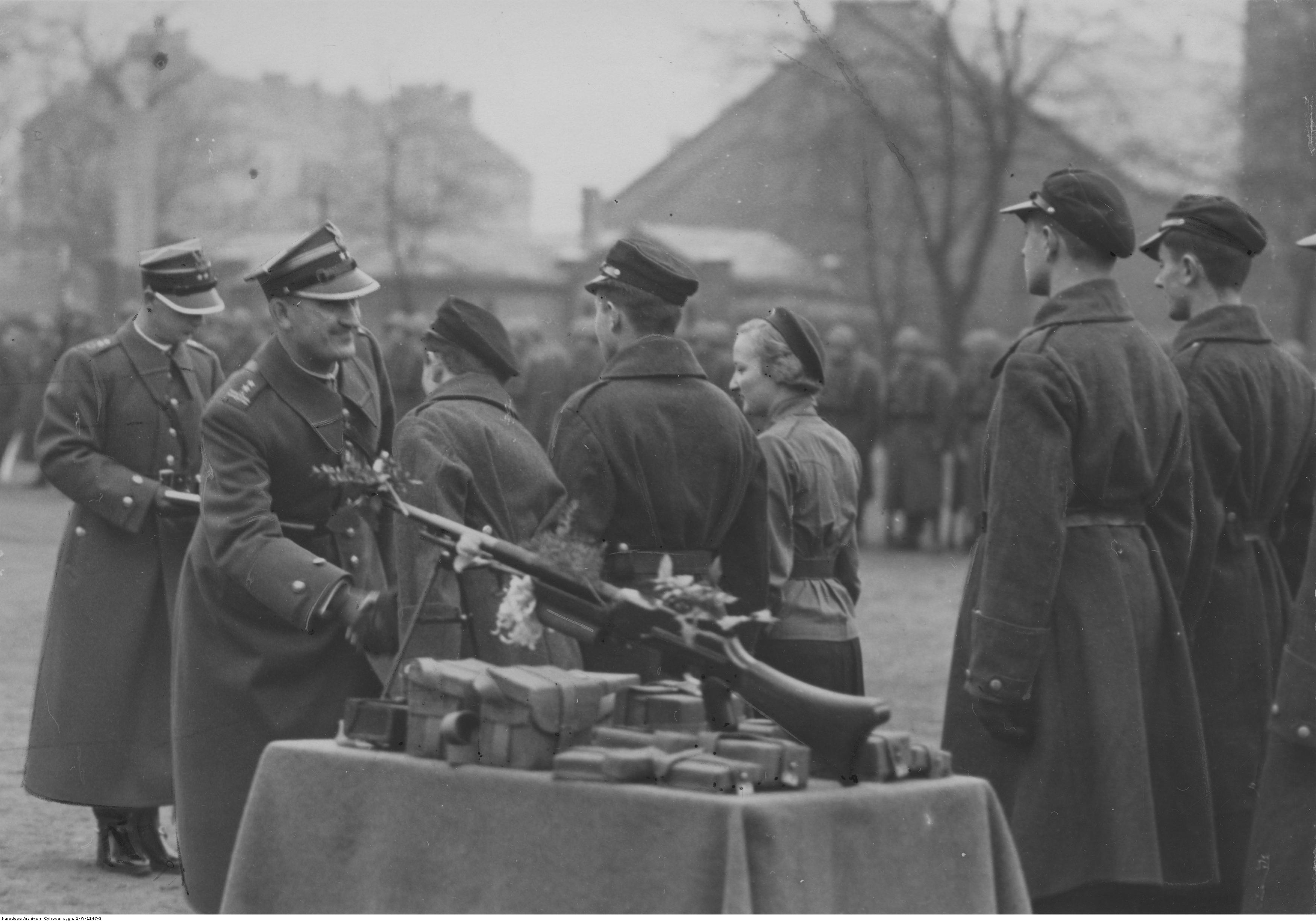 Kurs podchorążych rezerwy 14 Dywizji Piechoty w Poznaniu. Płk Tomasz Rybotycki przyjmuje 7,92 mm ręczny karabin maszynowy Browning wz. 28, dar dla wojska od młodzieży z Międzychodu. Koncern Ilustrowany Kurier Codzienny - Archiwum Ilustracji. Sygnatura: 1-W-1147-3